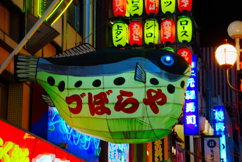 fugu